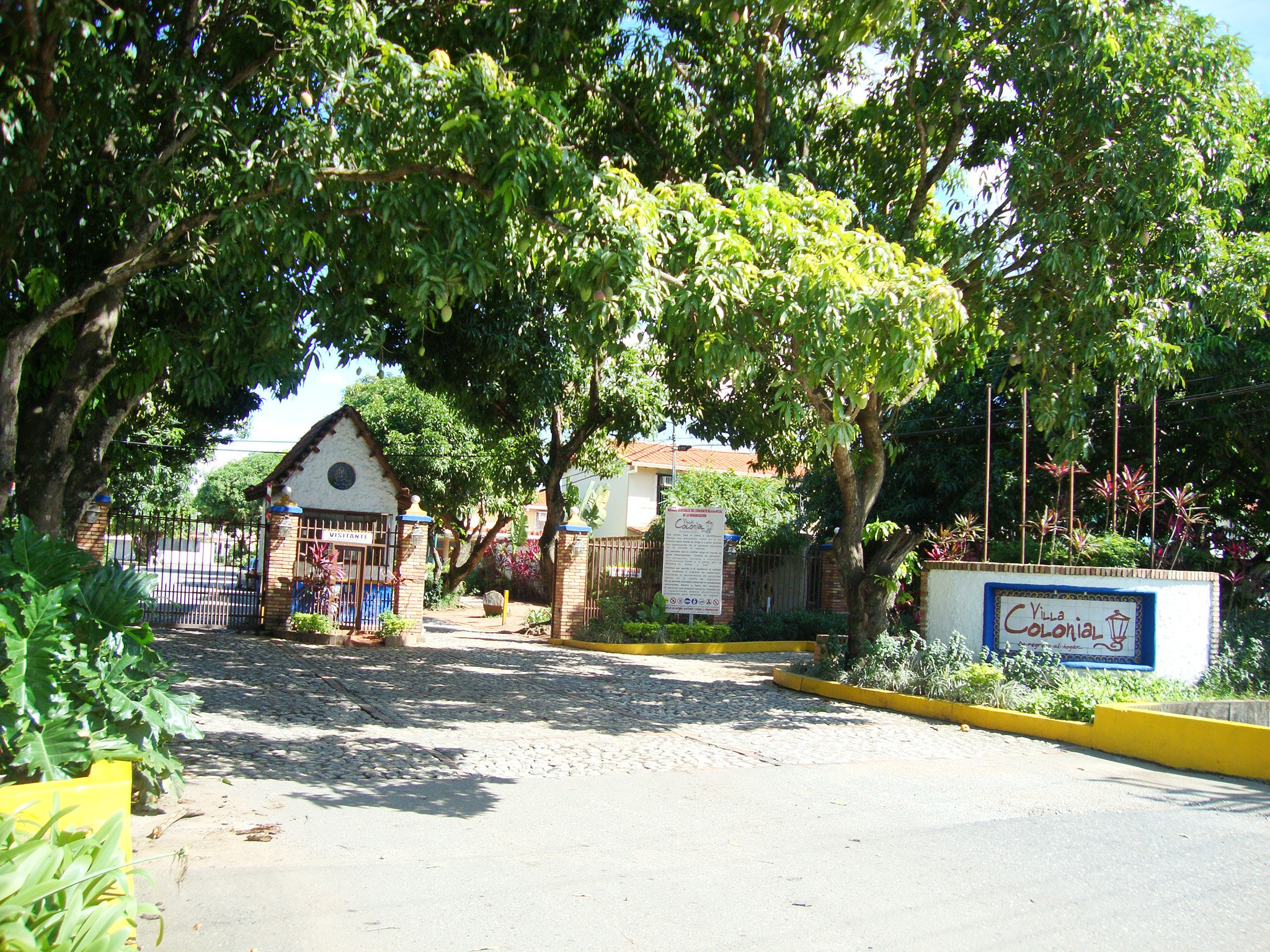 Urbanizacion Villa Colonial, Araure, Portuguesa, Venezuela